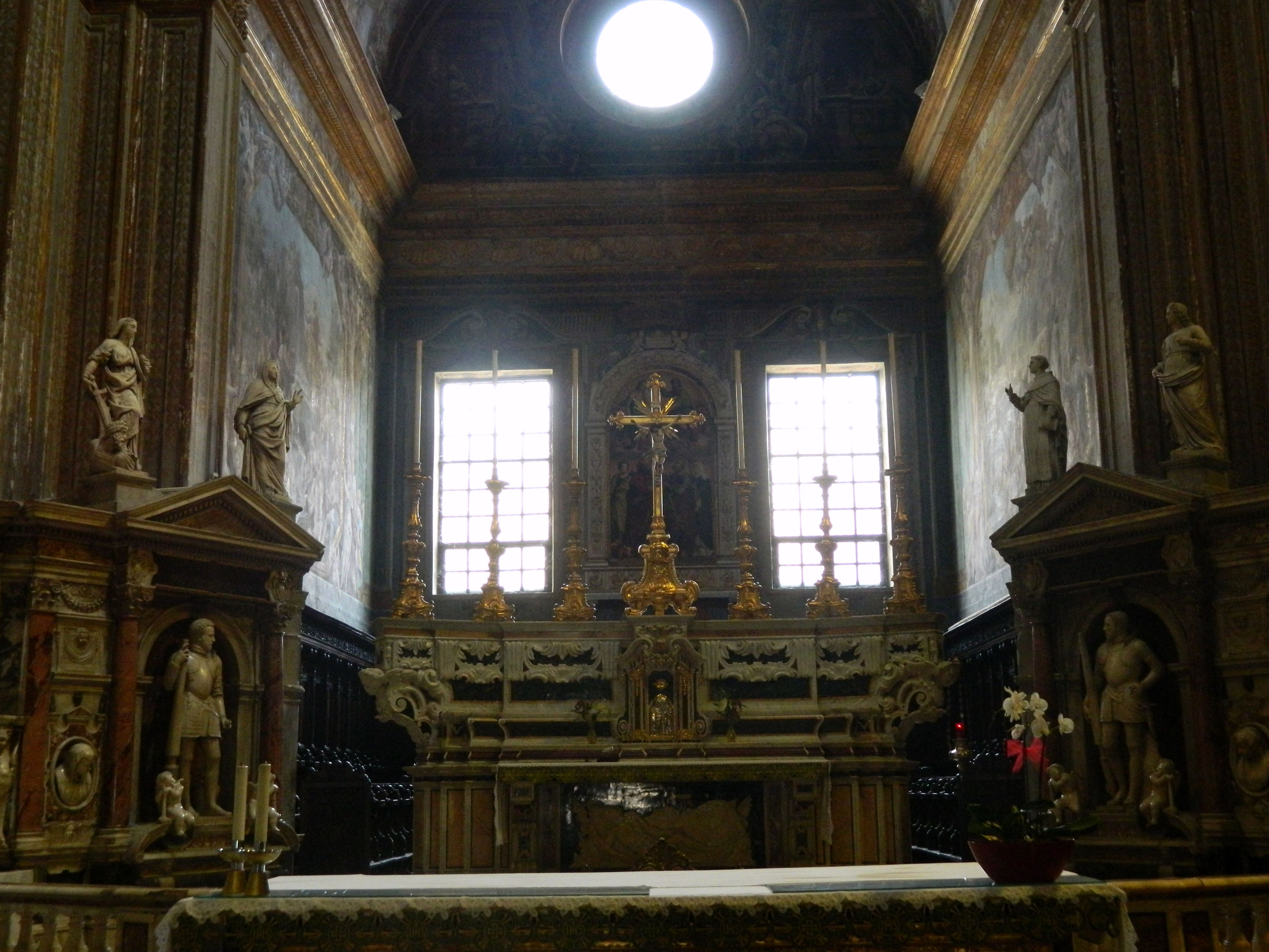 Chiesa di Santa Caterina a Formiello (Napoli) - l'altare maggiore con la quinta marmorea, scenograficamente disposta ai lati dell'altare